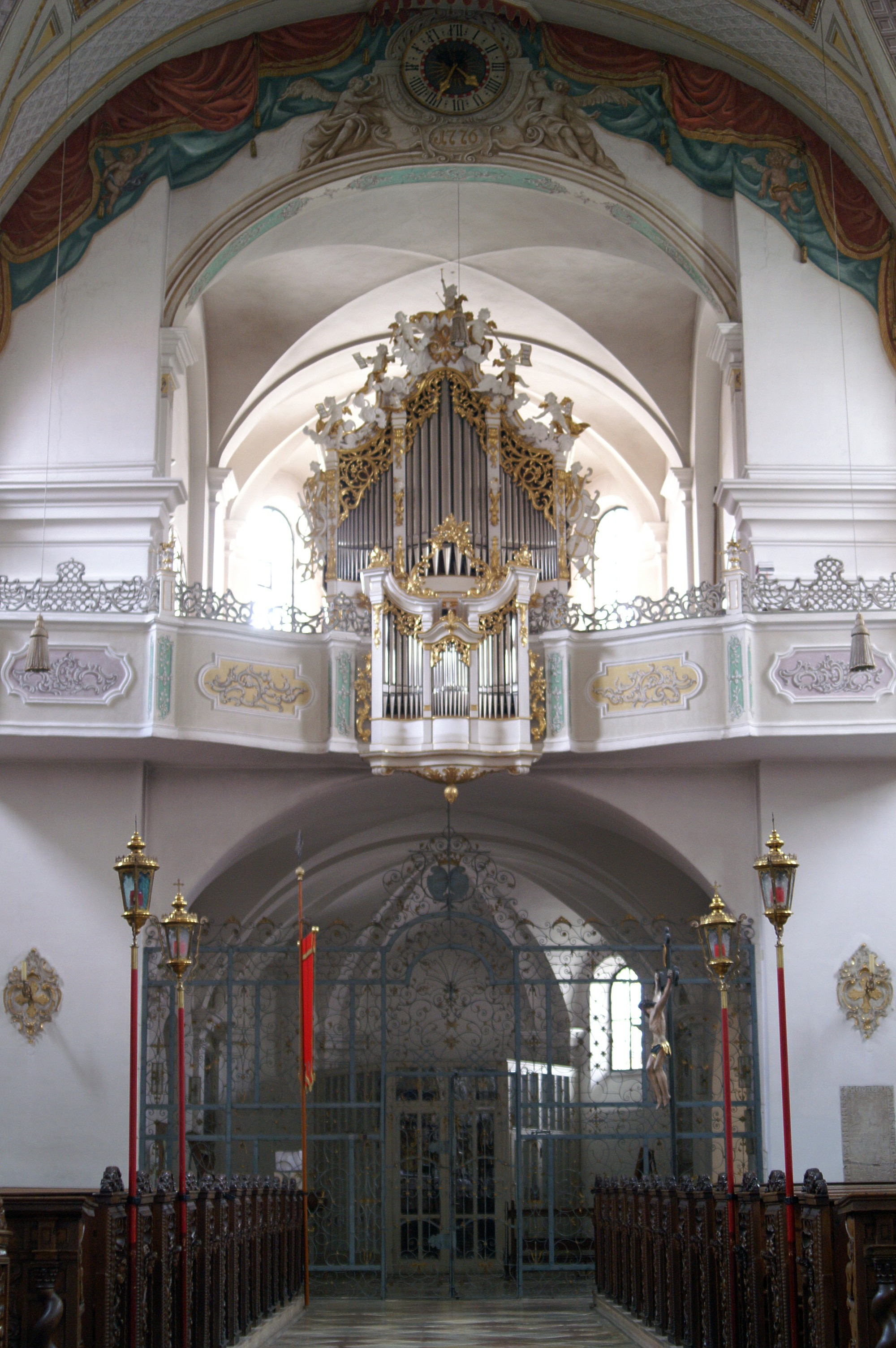 Orgel der Klosterkirche Mallerdorf